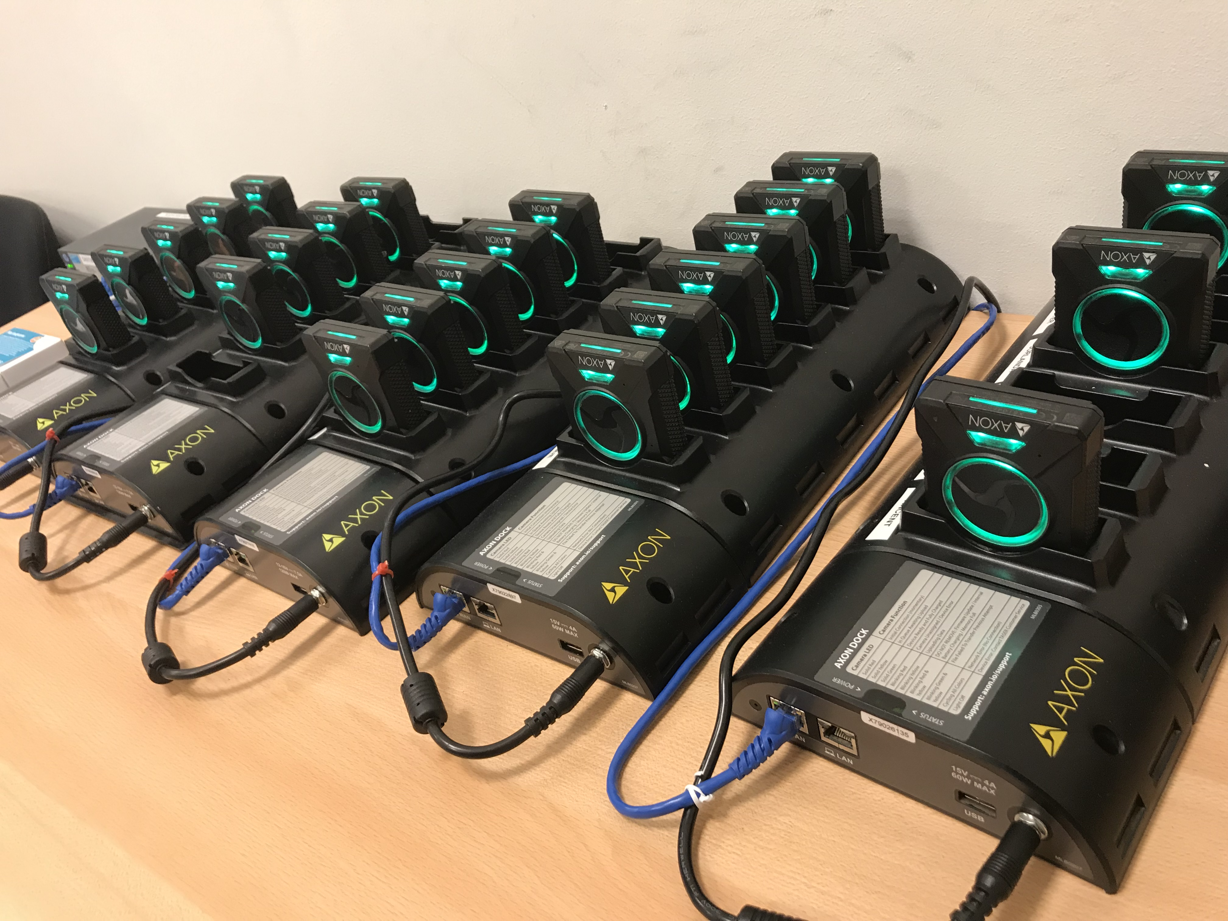 Vijf docking stations met zes bodycams elk op een bureau